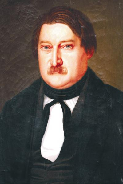 Szabó János festménye: Szász Károly (Vízakna, 1798. január 25. – Marosvásárhely, 1853. október 25.) államférfi, jogtudós, író, matematikus